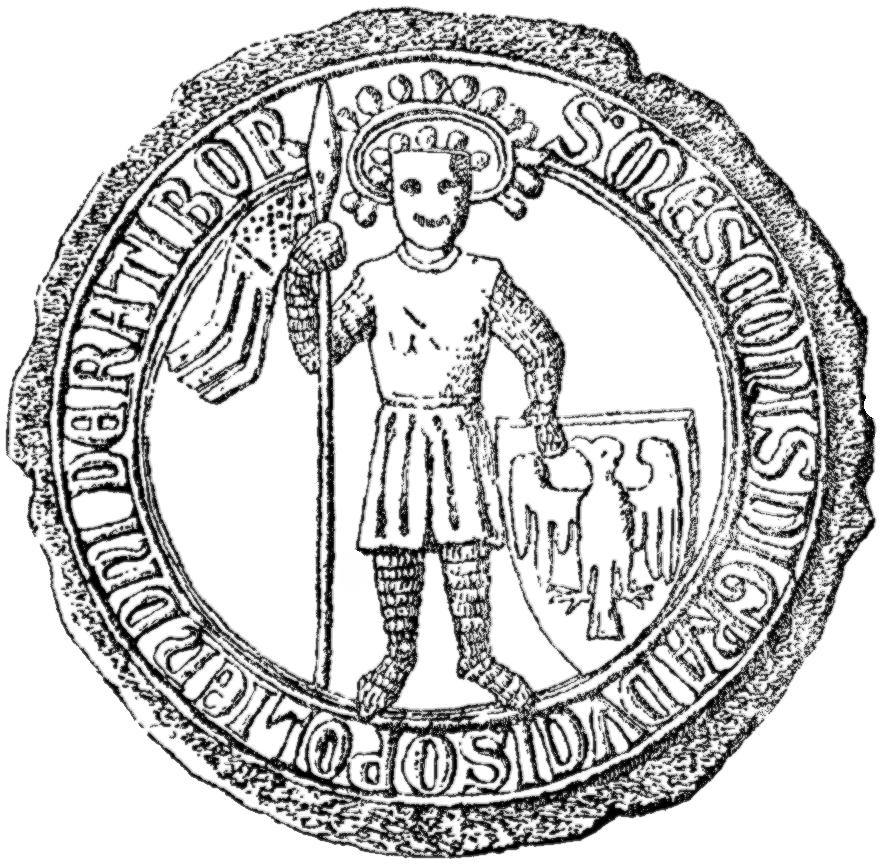 Mieszko I Cieszyński seal 1288